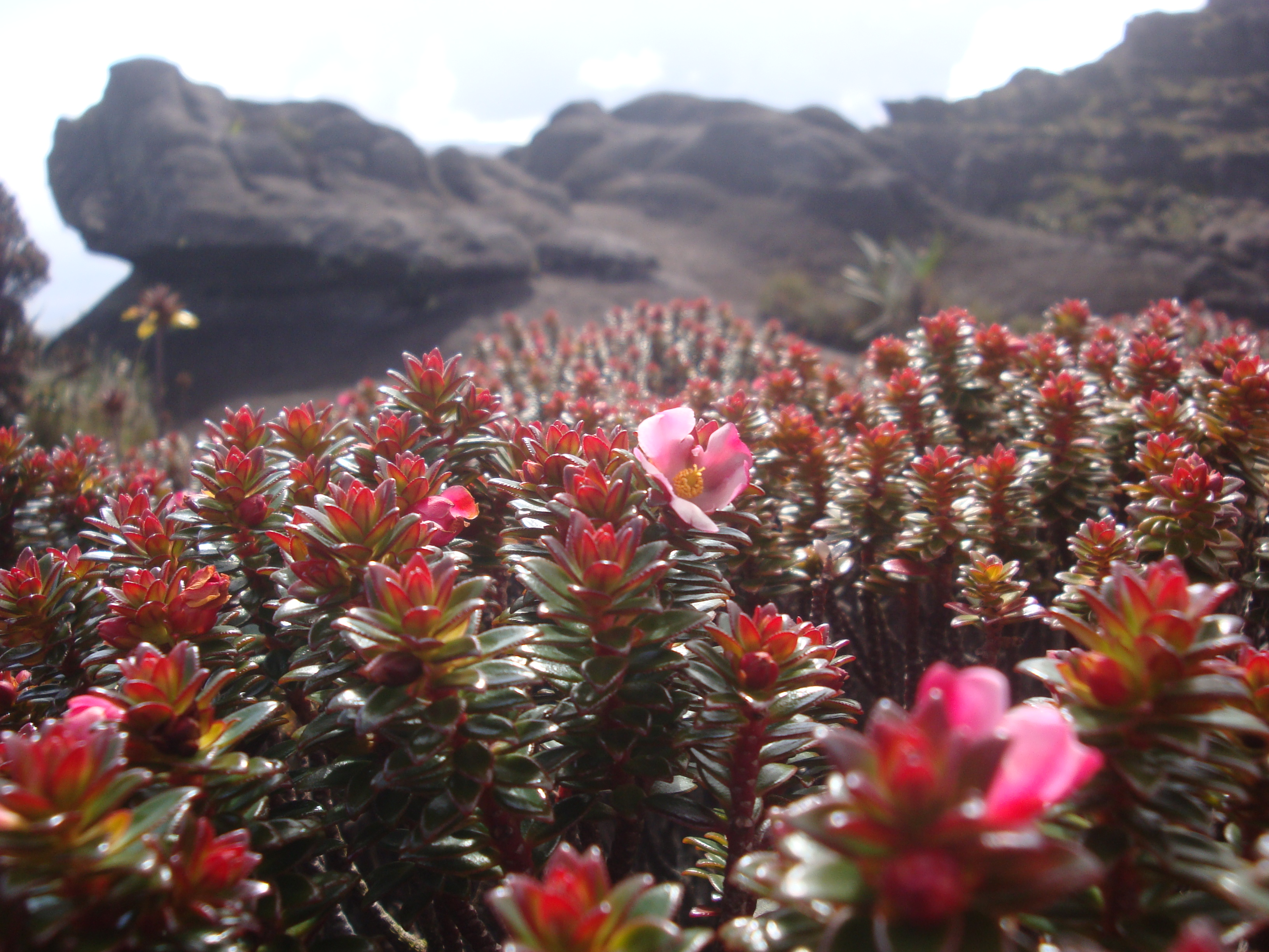 Arbusto en el tope del Tepuy Roraima.